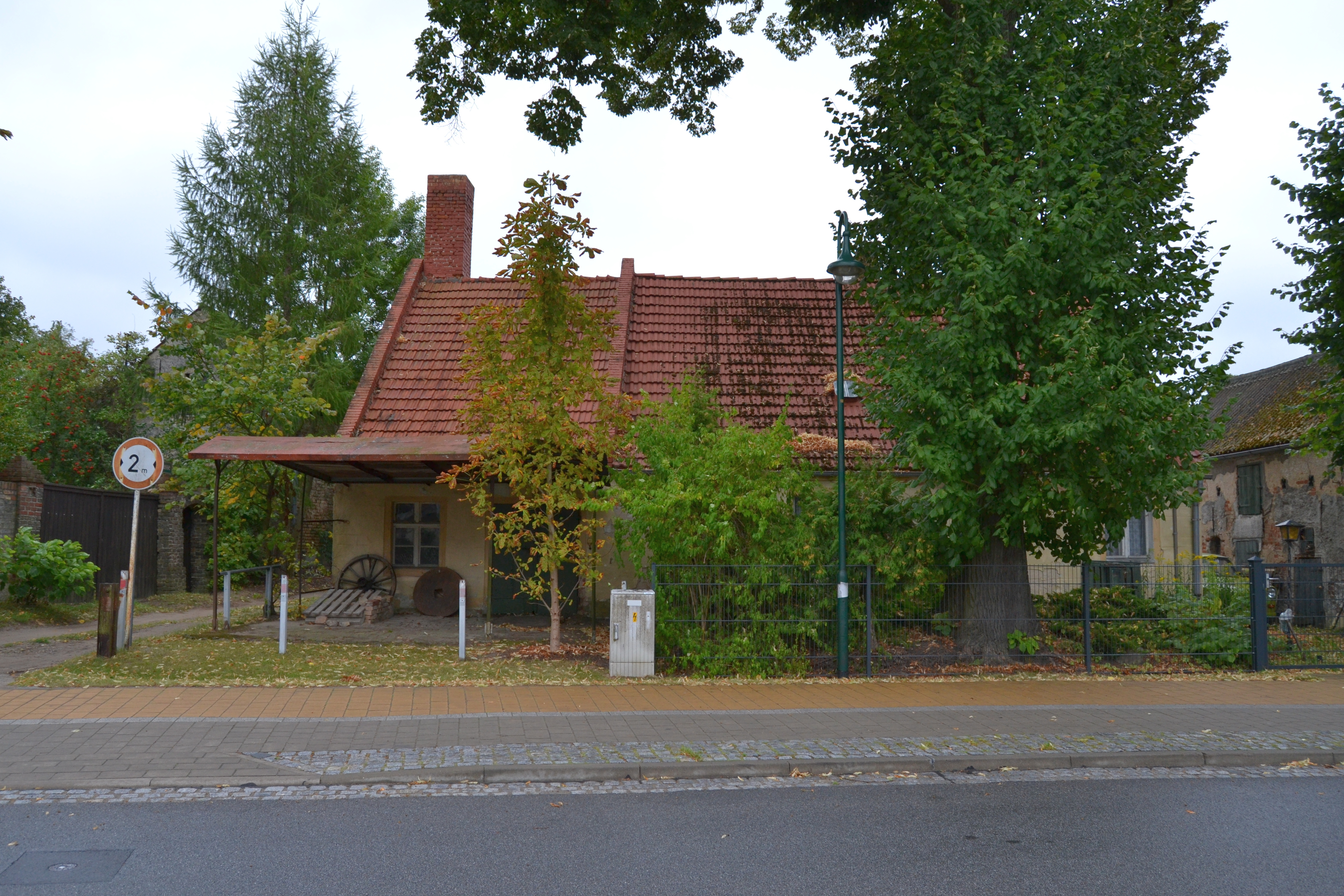 Dorfschmiede Kagel